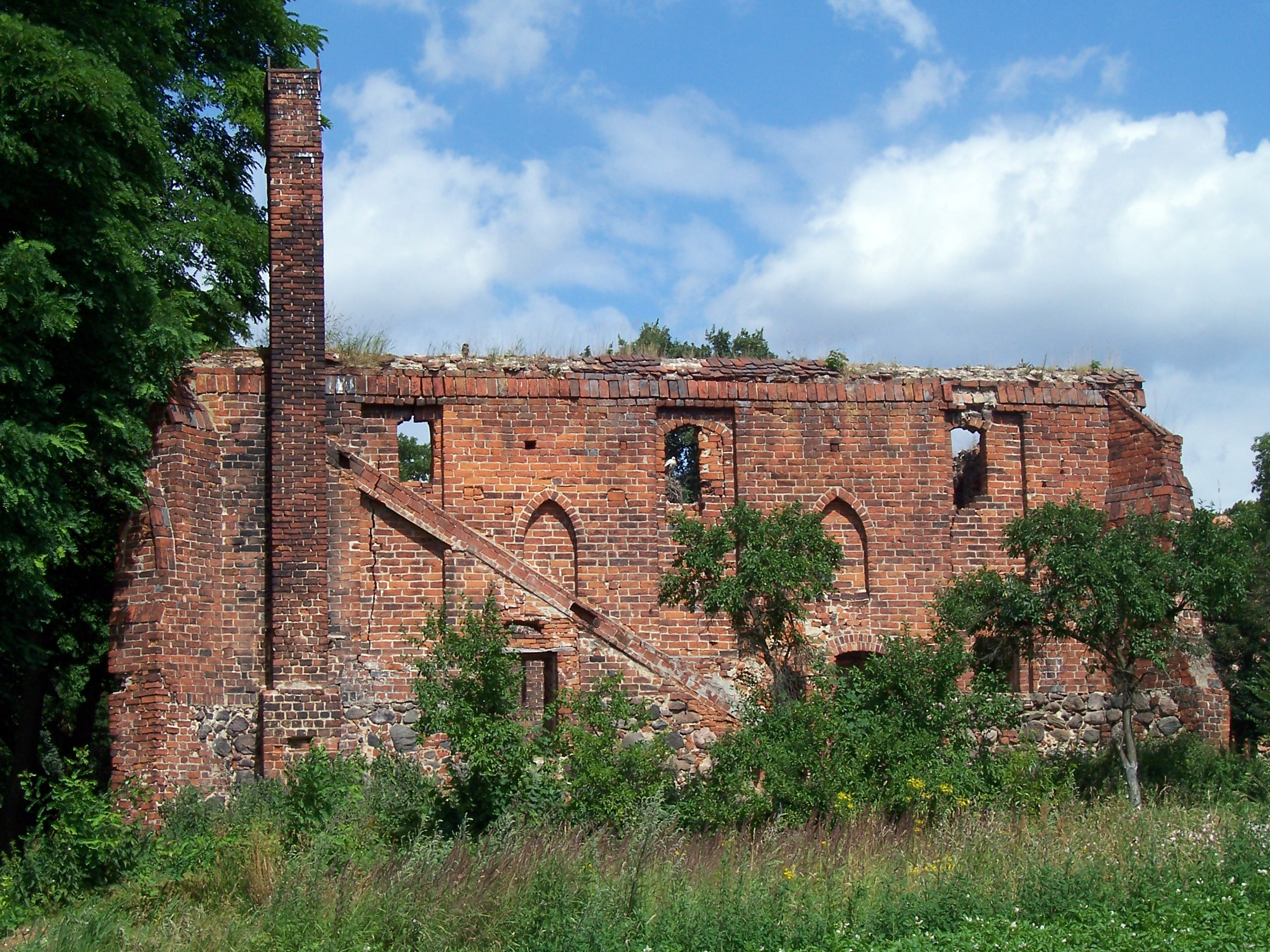 Bierzwnik - browar gotycki, ruina (zabytek nr rejestr. 411/92*